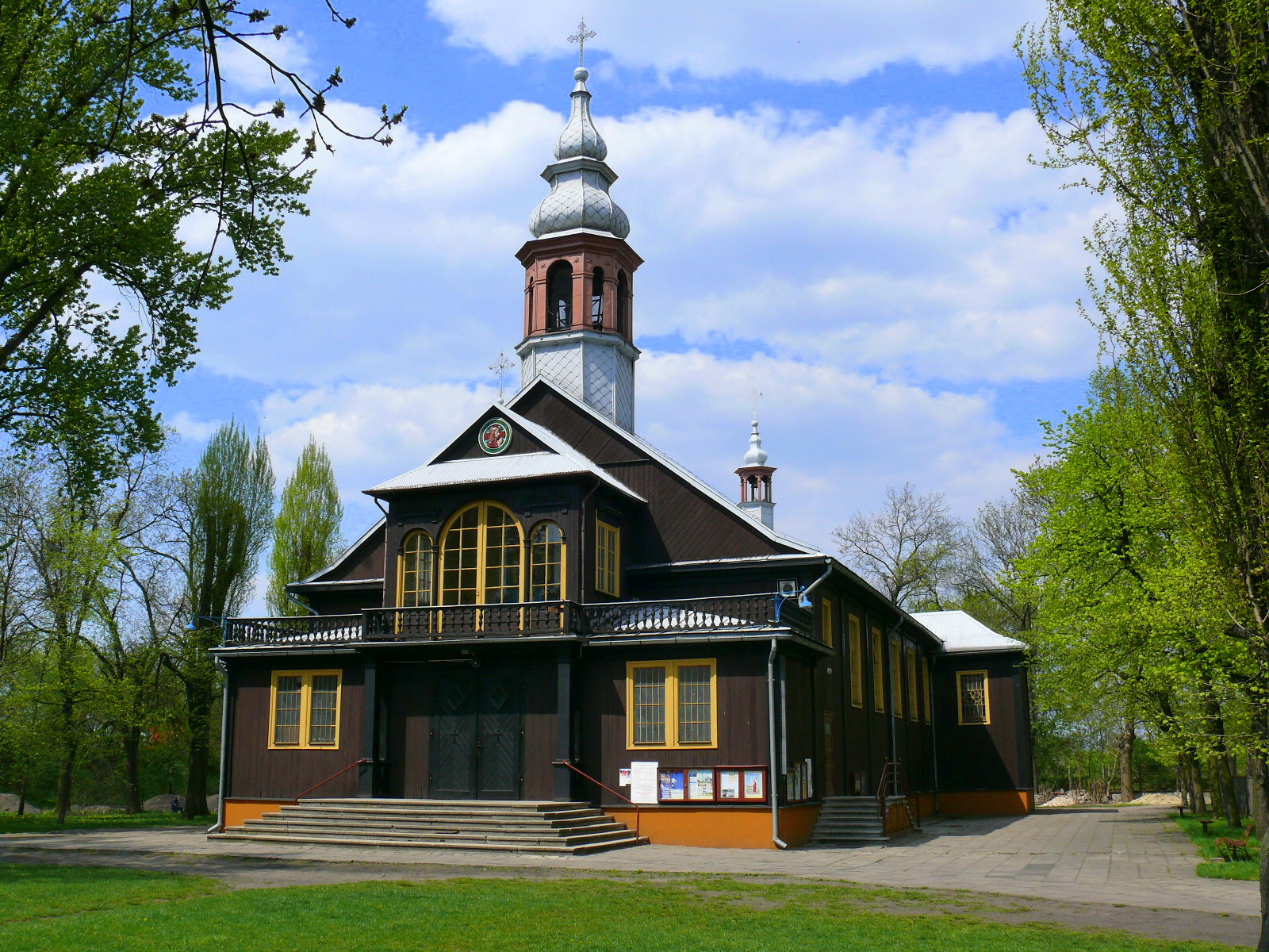 Zabytkowy kościół p.w. Najświętszego Zbawiciela przy Al. Włókniarzy 187